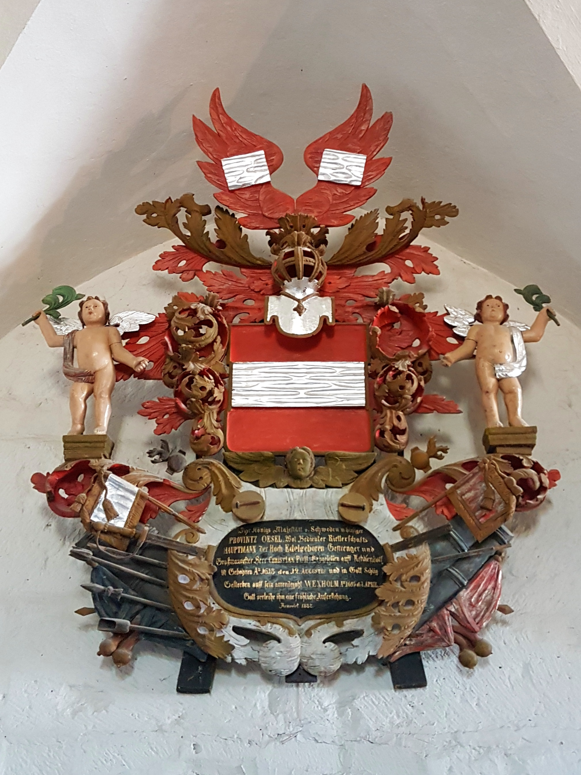 Christian von Polli vappepitaaf Valjala kirikust. Asub praegu Saaremaa Muuseumi püsiekspositsioonis Kuressaare linnuses.